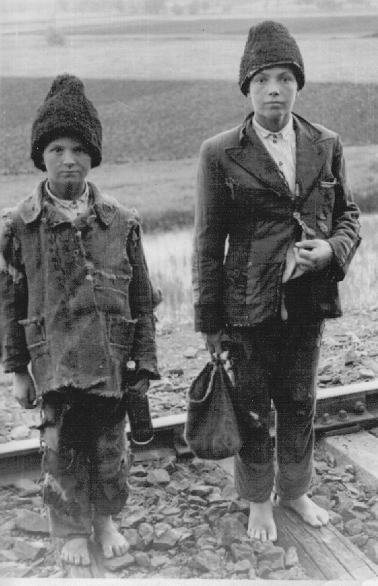 Lost Russian children ("Wolfskinder") during II.WW